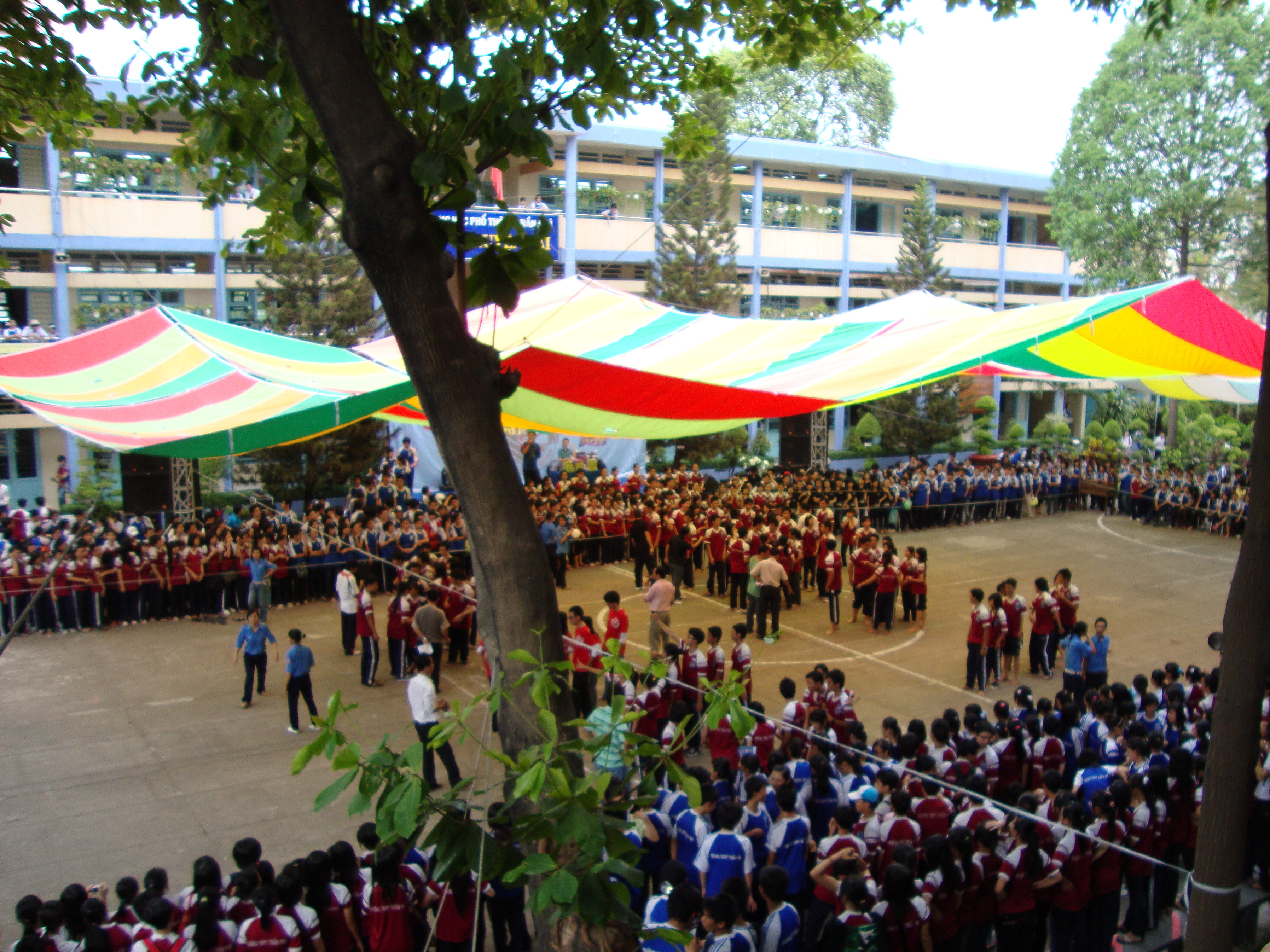 Trò chơi vận động, Trại Đoàn 2010, THPT Trần Phú TP.HCM